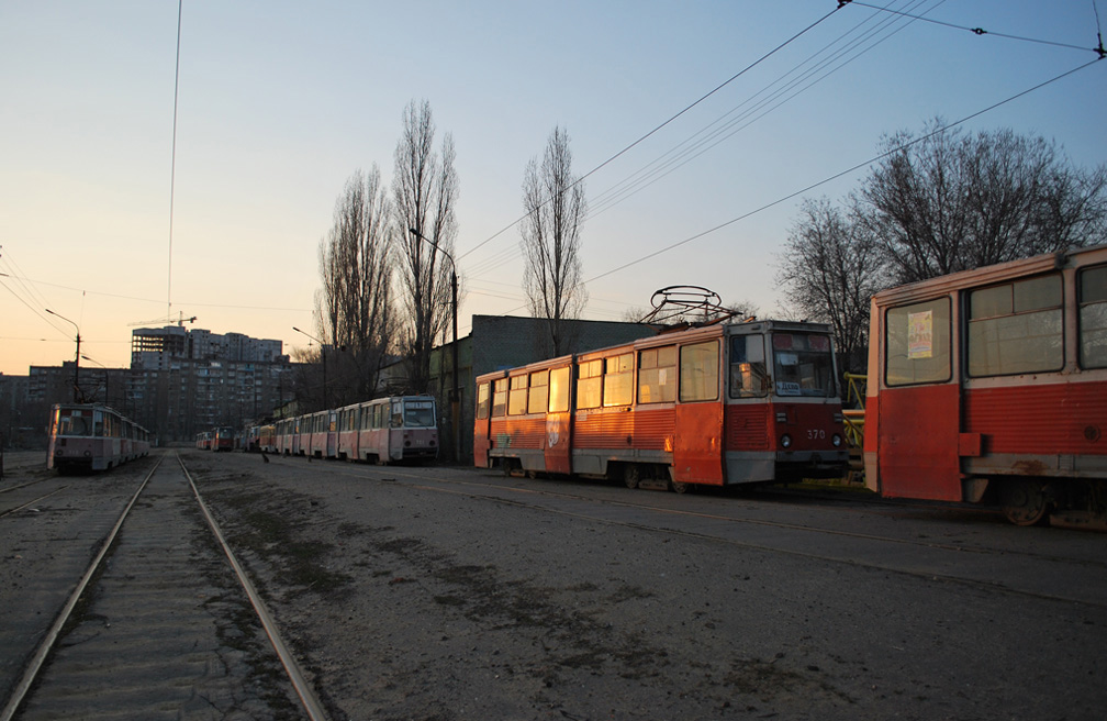 Трамваи в трамвайном депо №3 на ул. Кривошеина, 13 за несколько дней до закрытия движения.